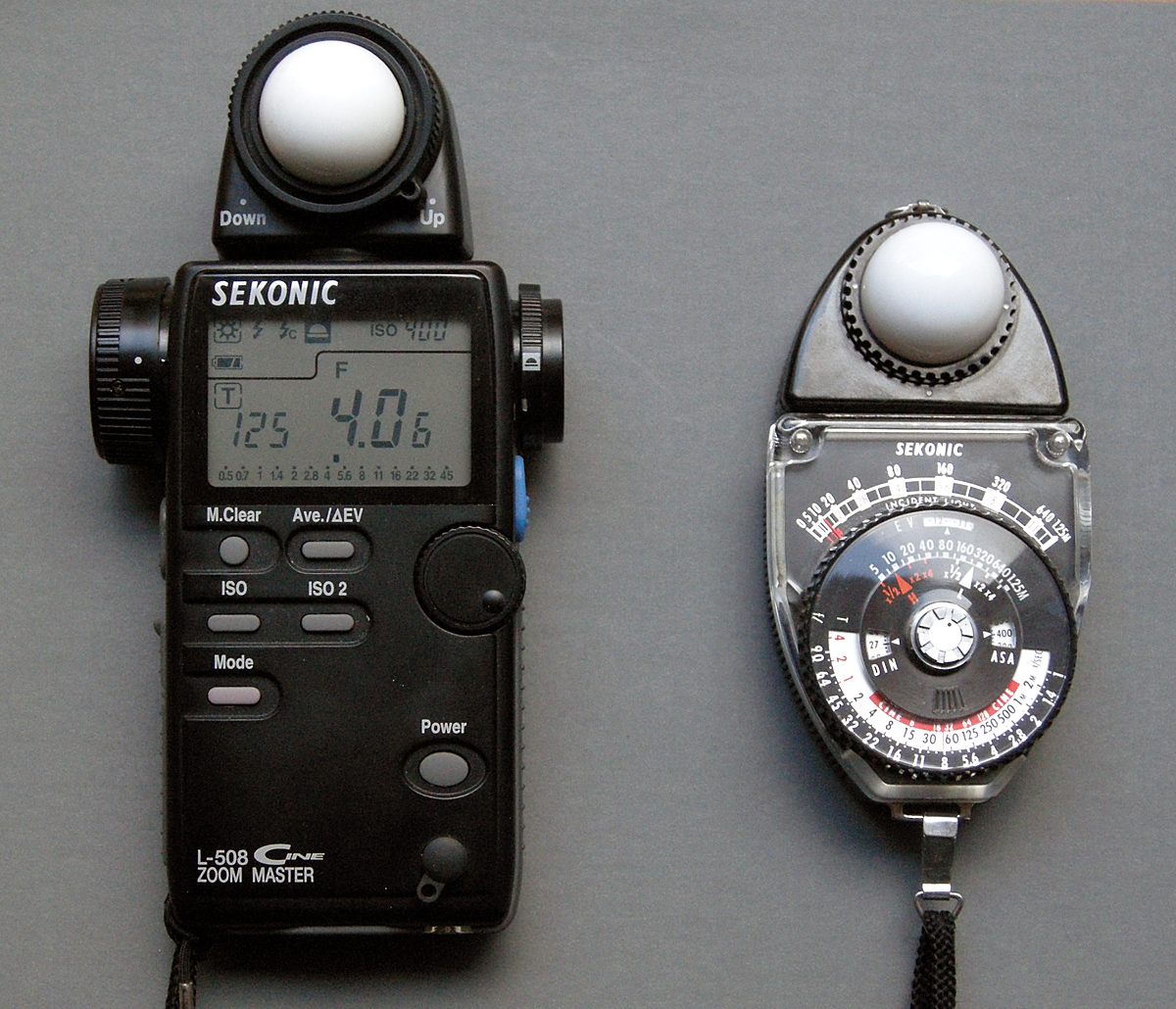 2 posemètres Skonic